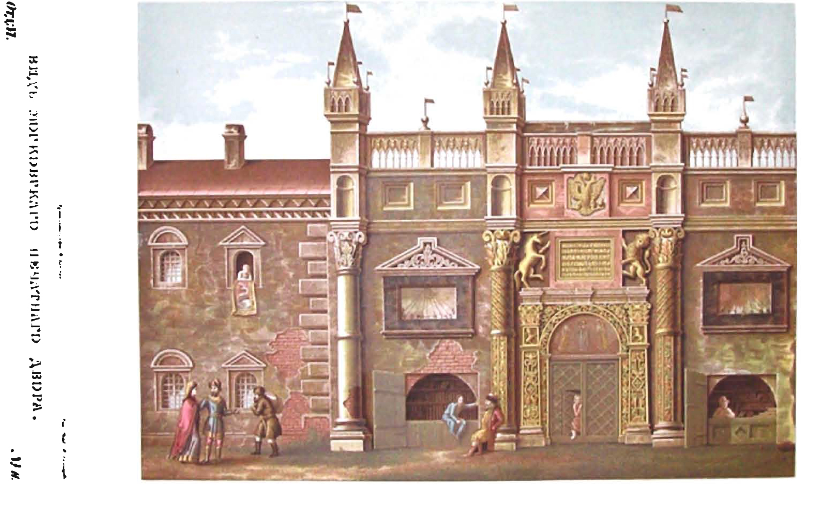 Древности Российского государства (Antiquities of Russian country), 1846—1853. Иллюстратор — Солнцев, Фёдор Григорьевич. Отделение VI. Памятники древнего русского зодчества Вид Московского Печатного двора. Рисунок Отд. VI. №11